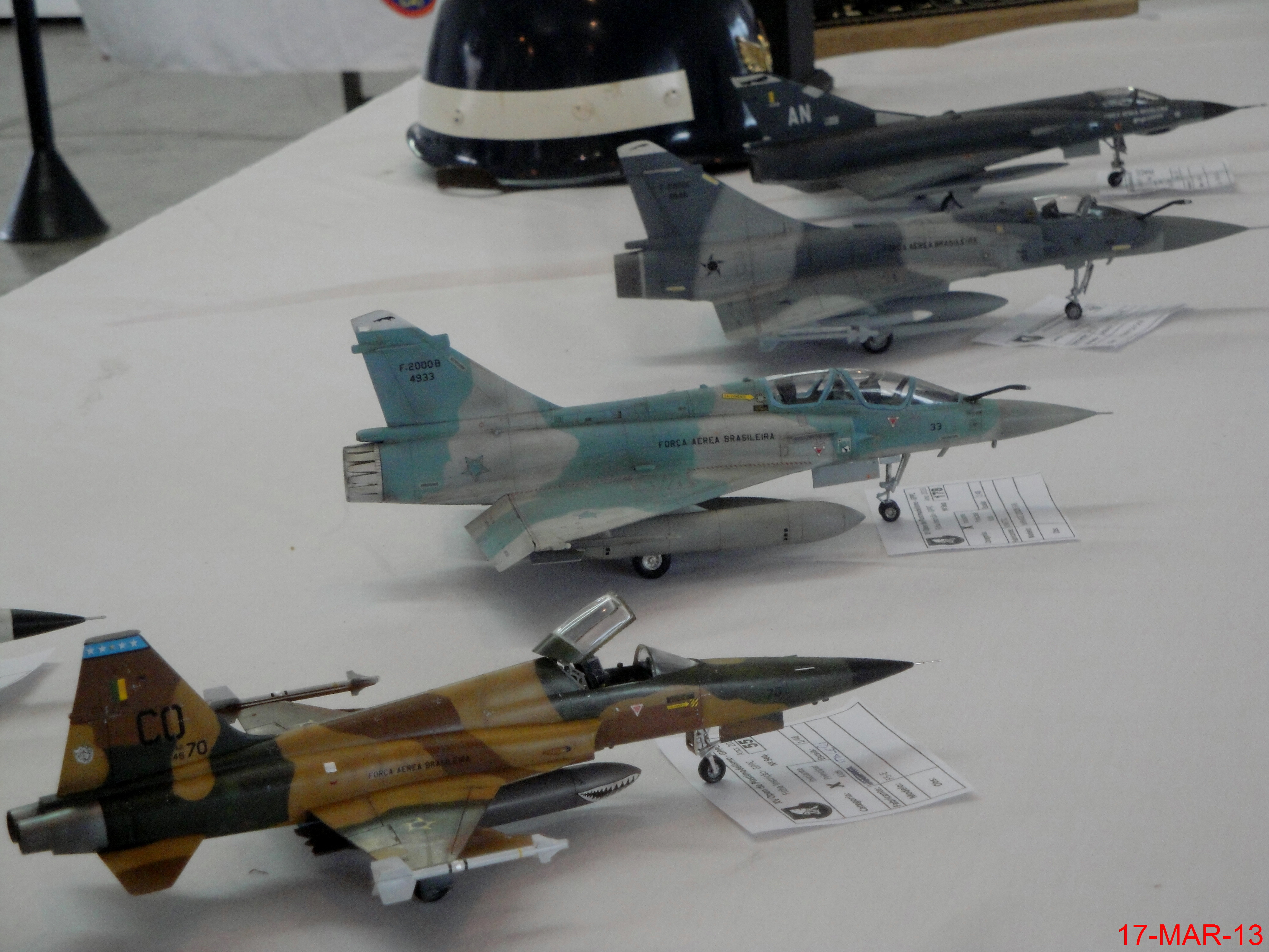 XVI Open de Plastimodelismo de Catanduva. Caças da FAB, F5-E, Mirage 2000 Biplace e ao fundo dois Mirage 2000 monoplace